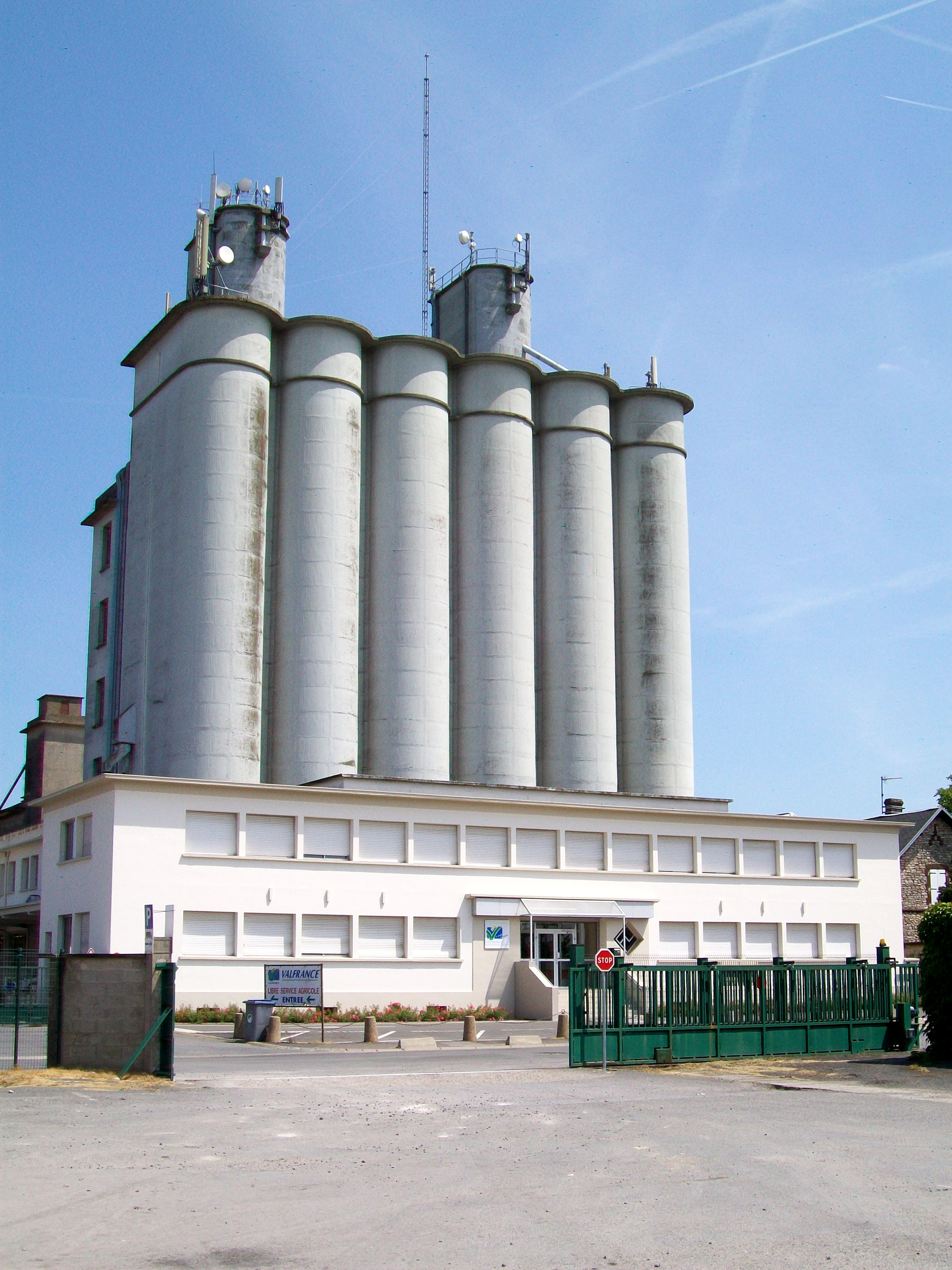 La coopérative agricole Valfrance, avenue Georges-Clémenceau : silos et administration.